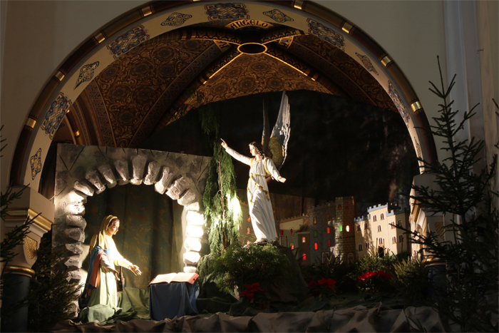 Crib in Katowice Panewniki, Poland (2010)